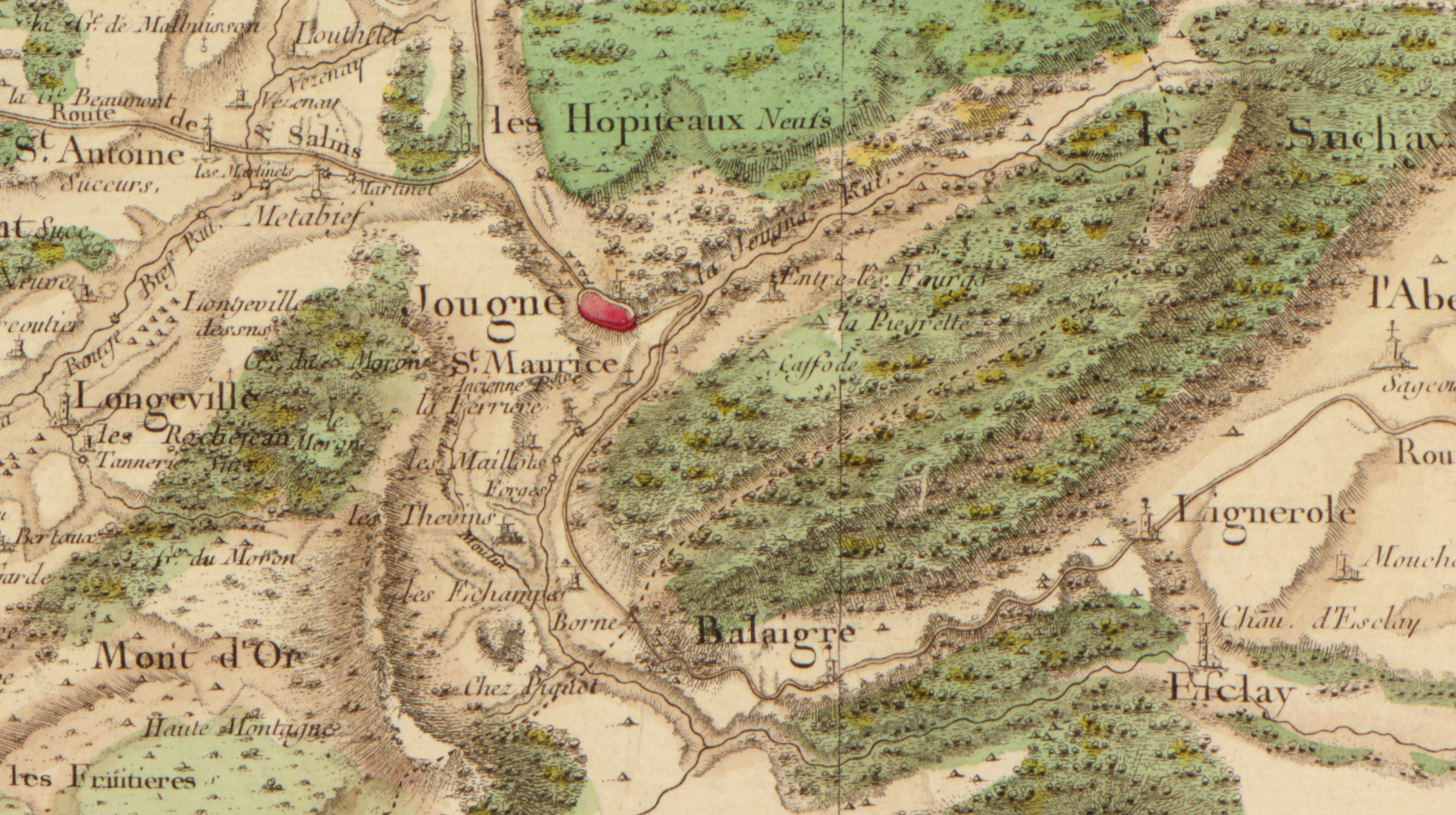 Carte de Cassini n°147 (Nozeroy, zoom sur Jougne), 1759.